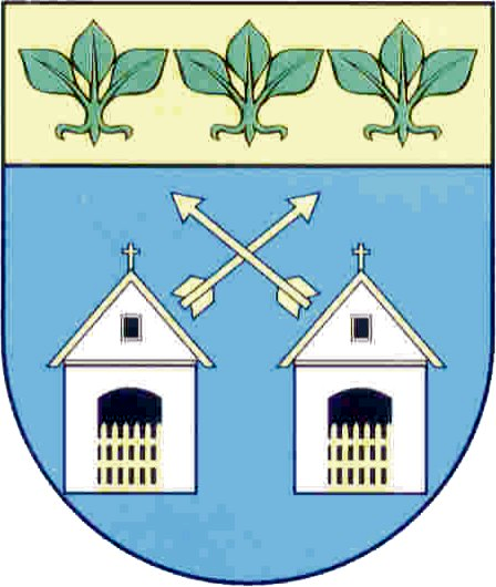 Herb Kochanowic, powiat lubliniecki, województwo śląskie